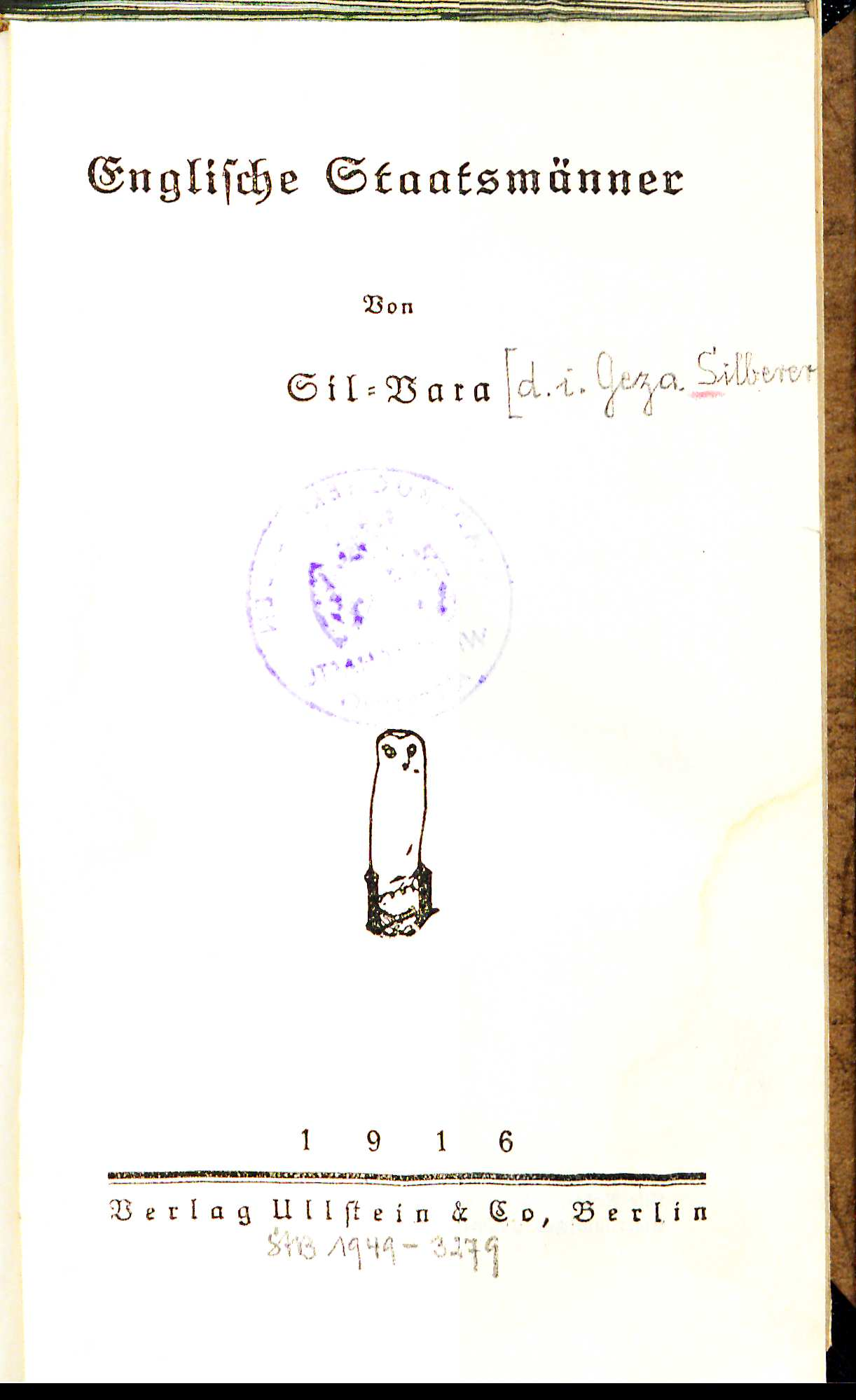 Sil-Vara Englische Staatsmänner. Berlin : Ullstein, 1916, Titelblatt Sil-Vara Englische Staatsmänner 1916